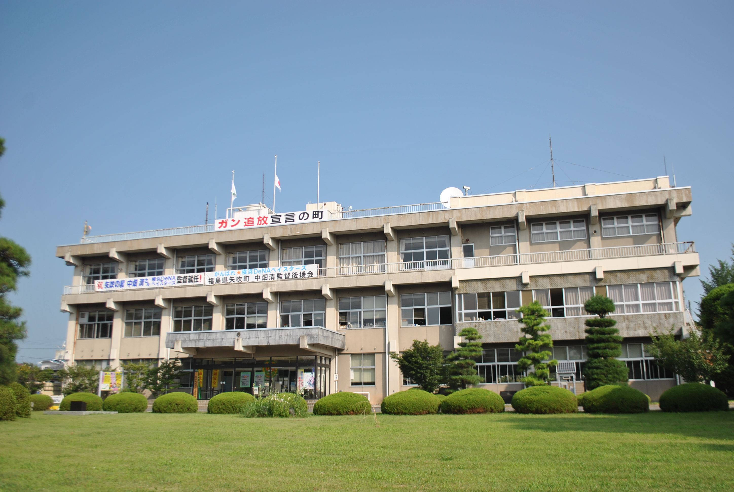 矢吹町役場